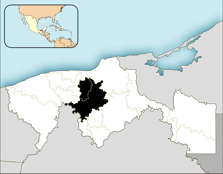 Mapa que muestra la localización y extensión de la zona metropolitana de la ciudad de Villahermosa en el estado mexicano de Tabasco. Dicha zona está conformada por los municipios de Centro [en donde se localiza la ciudad de Villahermosa] y Nacajuca.